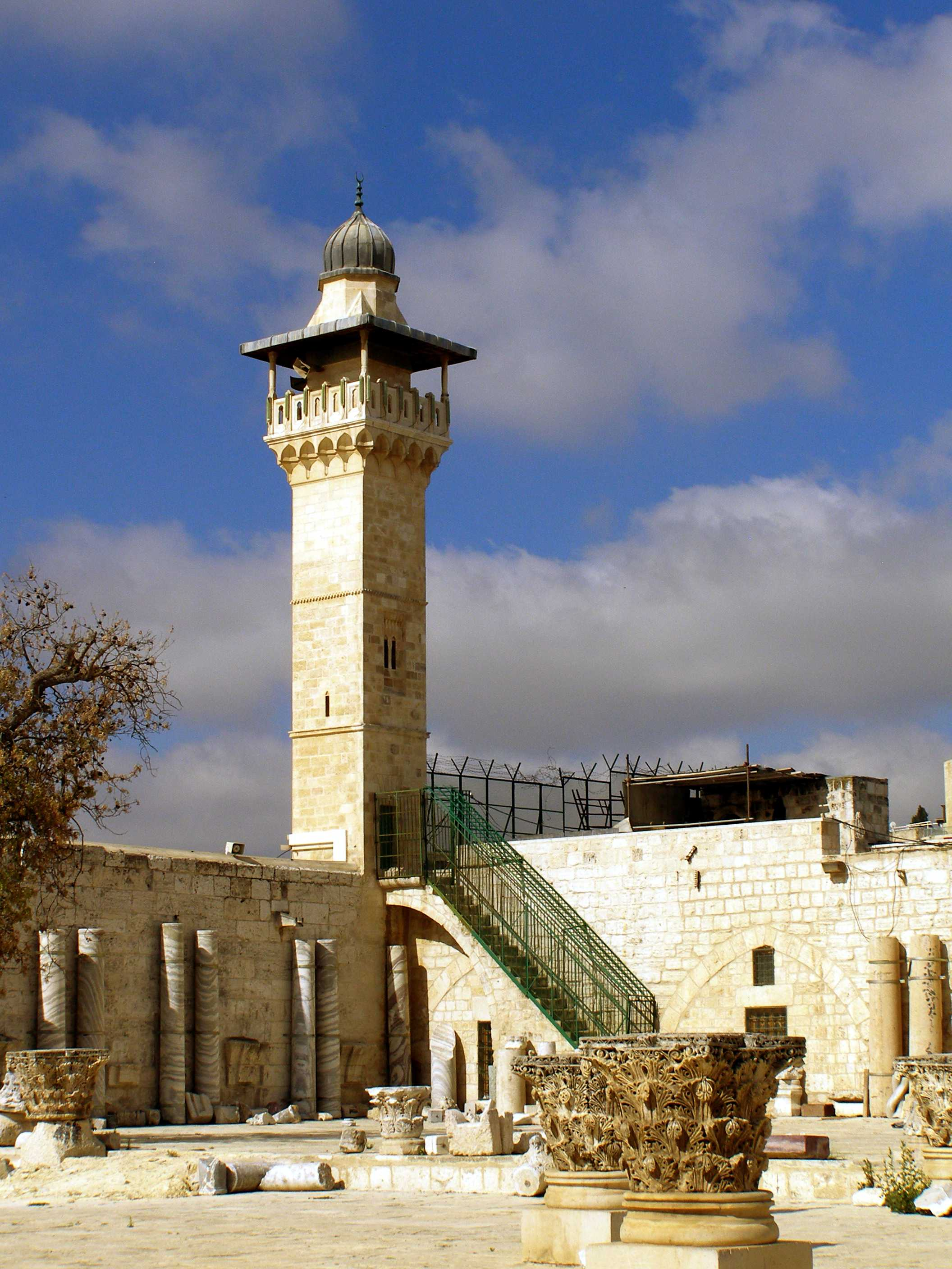 Temple Mount, Jerusalem fachariyya musk minarett